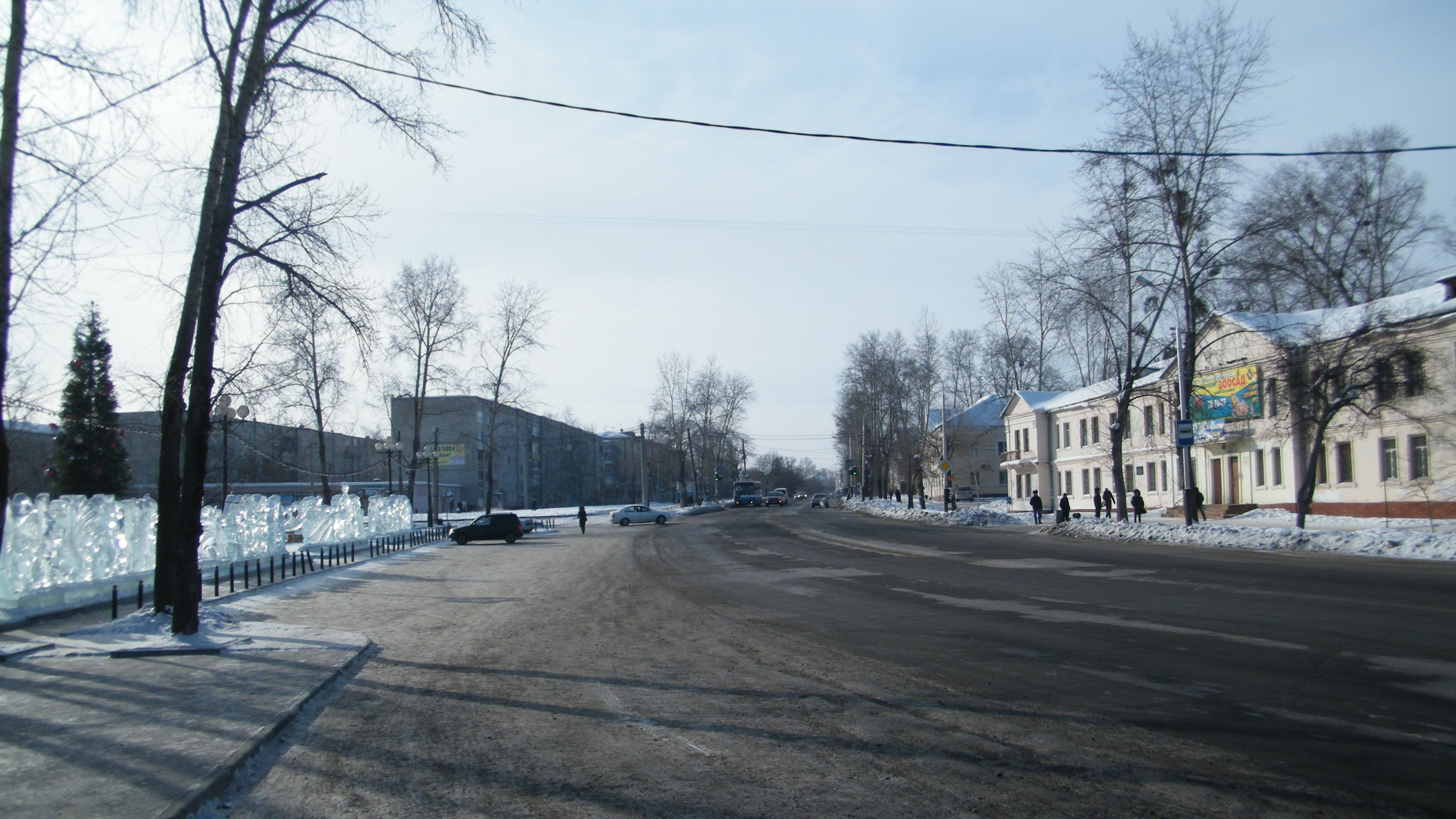 Хабаровск, Краснофлотский район, ул Руднева